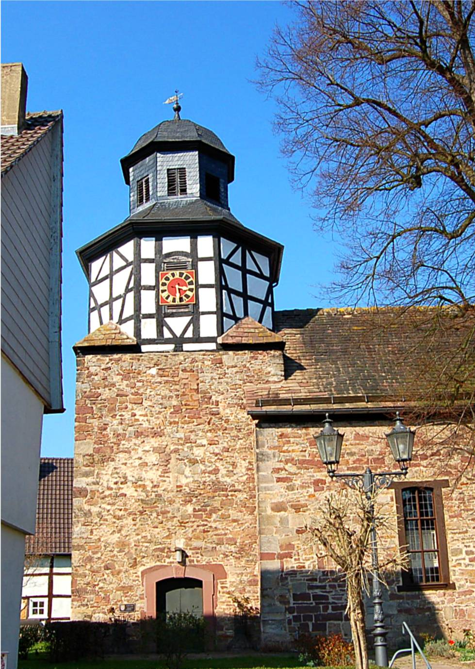 Die evangel. Kirche in Hümme